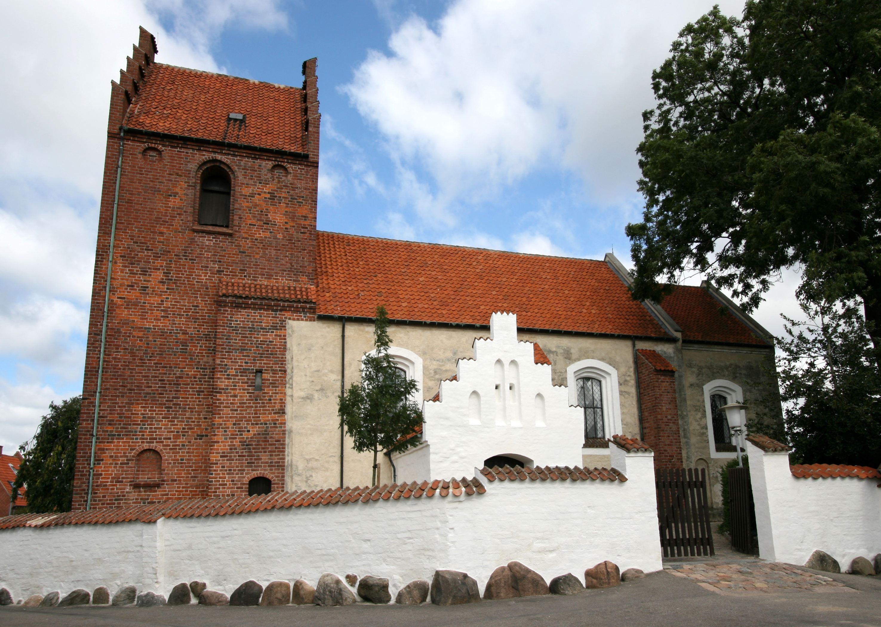 Sankt Jørgensbjerg Kirke in Roskilde, Denmark. Exterior